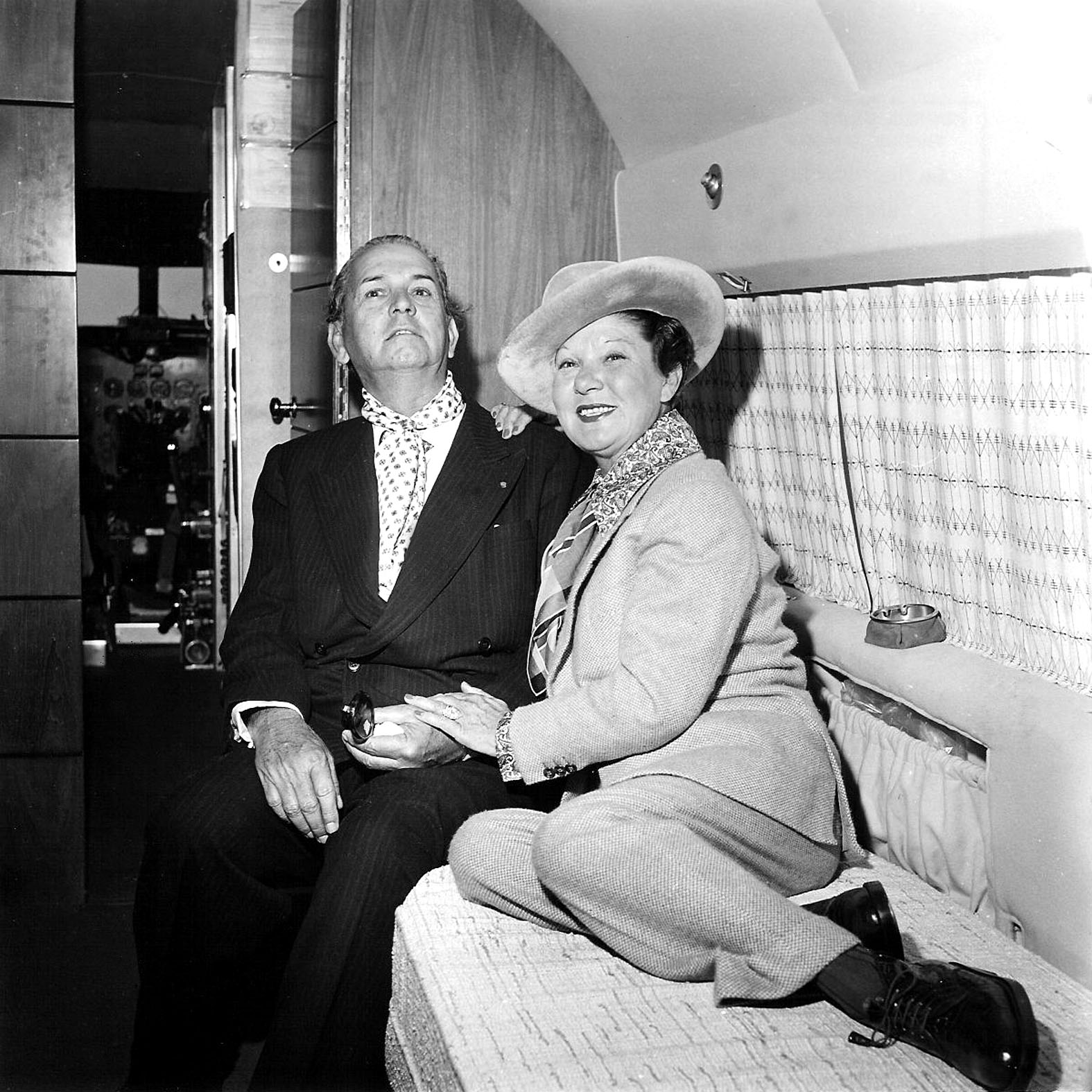 Félix Bénitez Rexach avec La môme Moineau Dans leur avion DC3